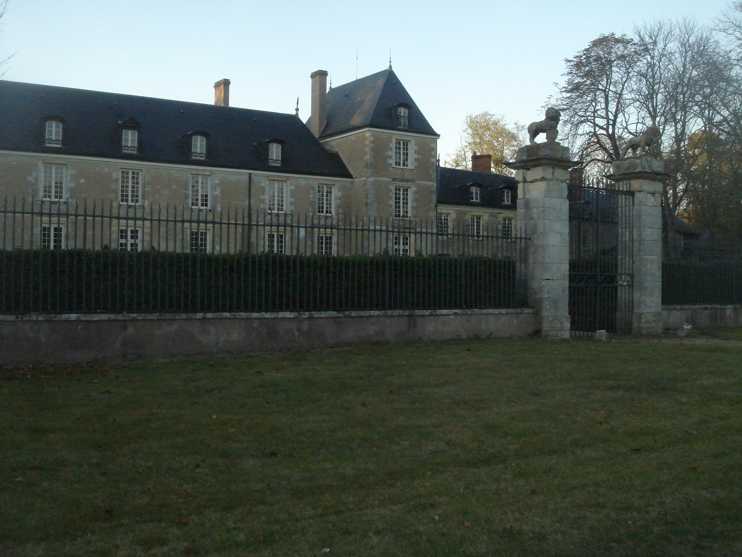 Château de Chenailles, Saint-Denis-de-l'Hôtel, Loiret, France.